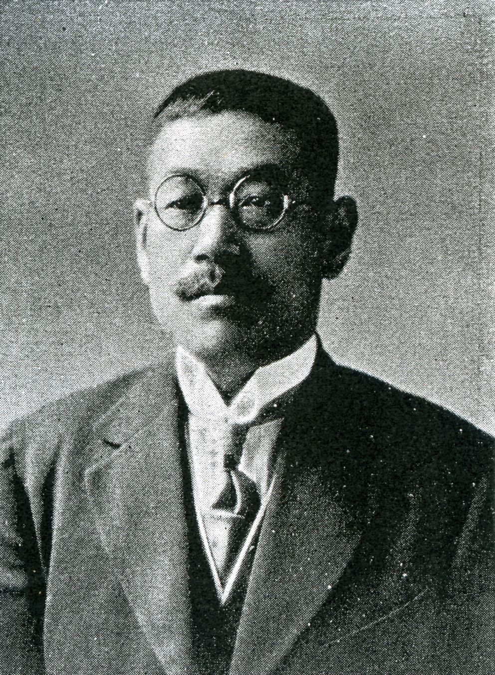 この写真は、鈴木富士彌（1882-1946）の写真です。